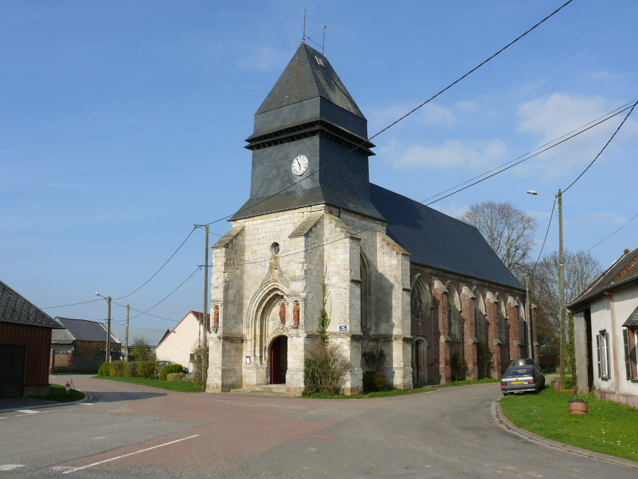 SENTELIE - L'Eglise Saint-Nicolas